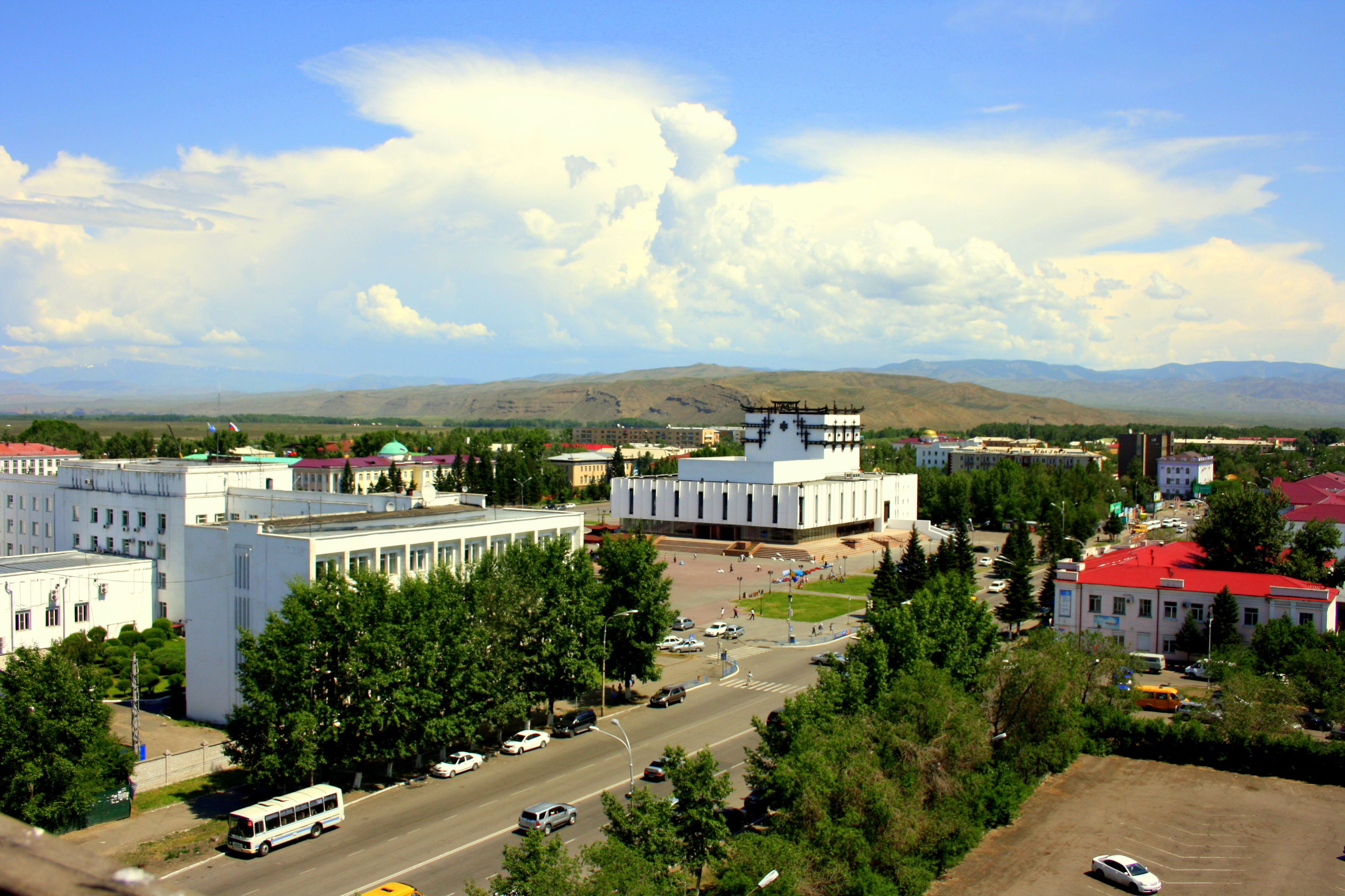 Кызыл